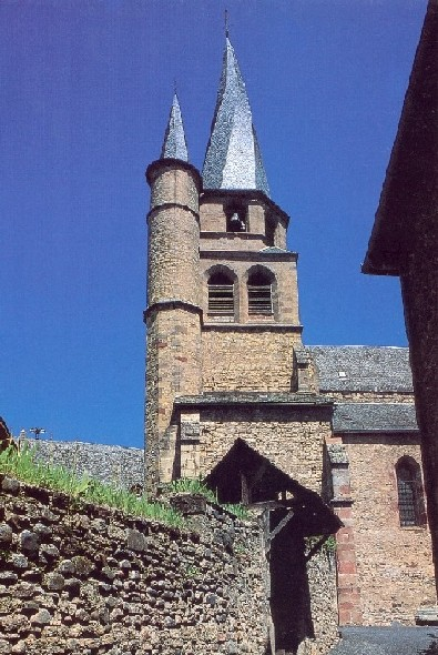 Église de Saint-Côme d'Olt (Aveyron, Fr) sur le Chemin de St. Jacques ("Via Podensis")